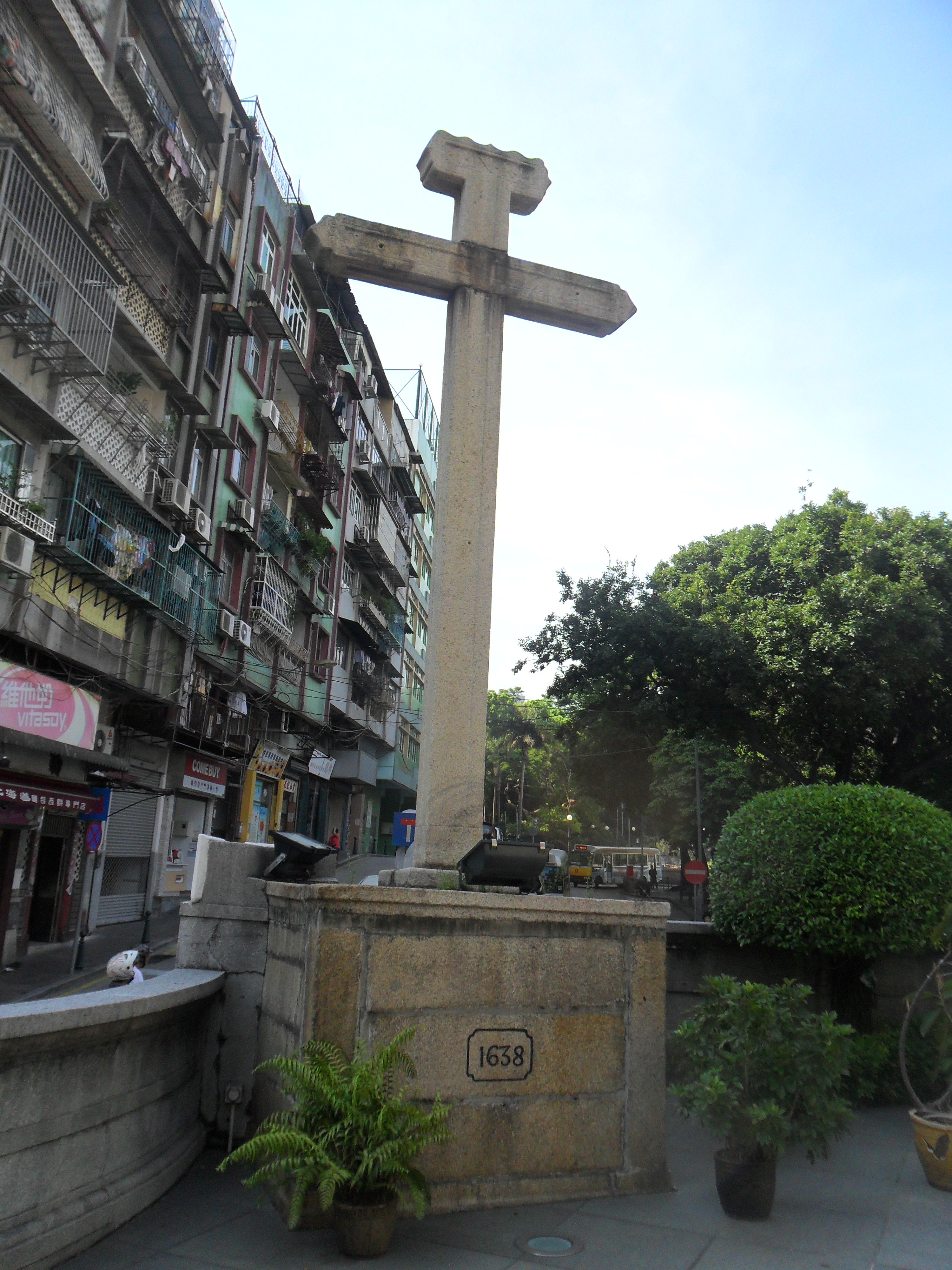 中文(香港): 聖安多尼堂, 澳門, 中國